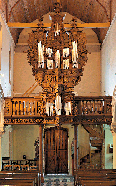 Buffet de l'orgue de Nielles-lès-Ardres après la restauration de 2005